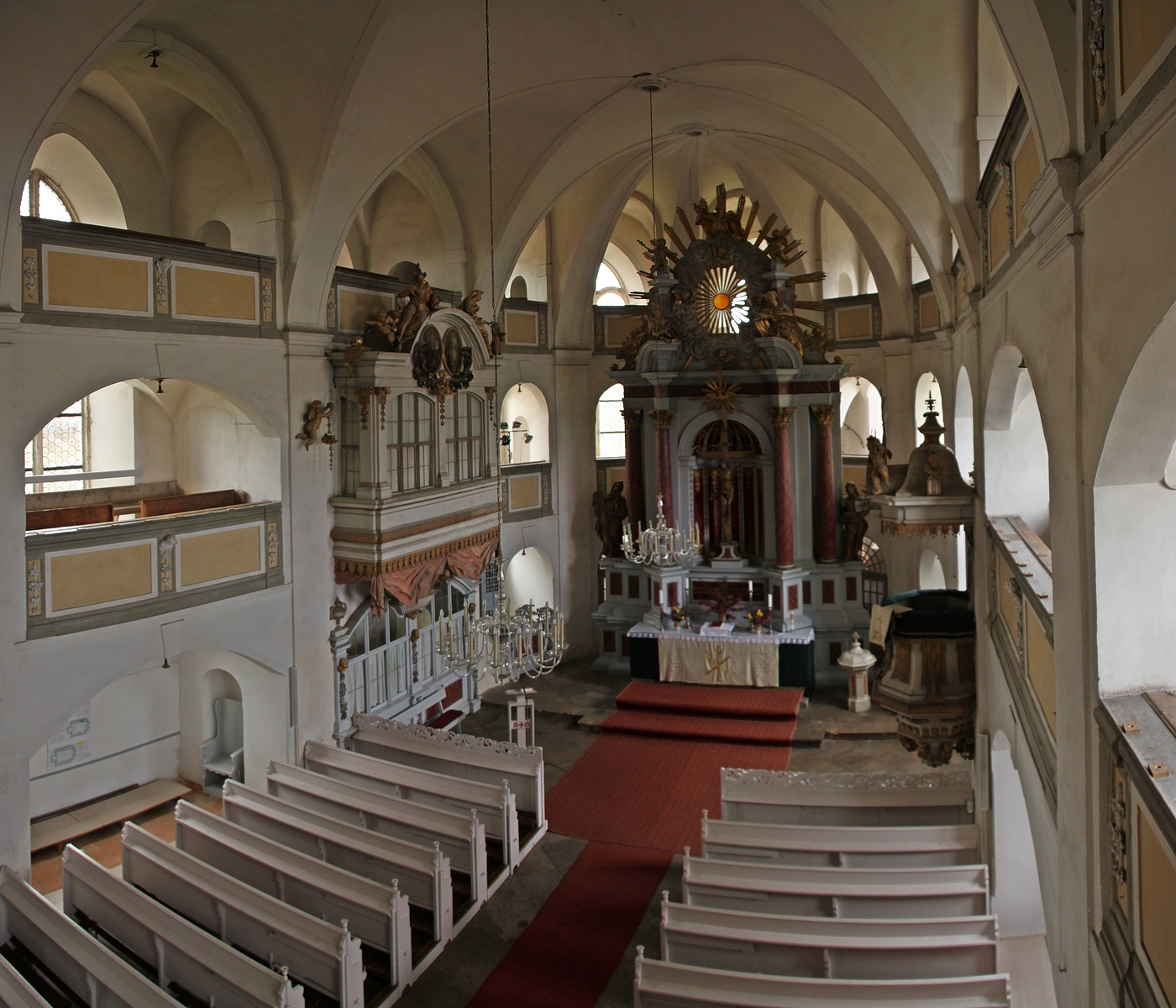 Hainewalde: Blick in die evangelische Kirche. Die heutige Kirche ist wahrscheinlich der dritte Kirchenbau des Ortes. Die Grundsteinlegung erfolgte 1705, die Weihe 1711. Der Bau wurde durch den Einfall der Schweden in Sachsen von 1703 bis 1705 unterbrochen. Bauherren und Stifter der Kirche waren der kursächsische Obrist Otto Ludwig von Kanitz und seine Gattin Victoria Tugendreich von Kanitz geb. von Kyaw. Das Äußere der Kirche ist schlicht gehalten. Mit reichlich 50 Metern zählt der Turm zu den höchsten Dorfkirchtürmen der Oberlausitz. Die gesamte Kirchenausstattung befindet sich noch im ursprünglichen Zustand vom Anfang des 18. Jahrhunderts. Dies verleiht der Kirche einen besonderen kulturellen und kunsthistorischen Wert. (Am Kirchberg 6, Denkmal-Nr. 09271033, Sachgesamtheits-Nr. 09303500)